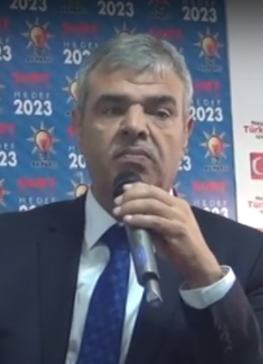 Başbakan Yardımcısı Veysi Kaynak, Adalet ve Kalkınma Partisi (AK Parti) Siirt İl Başkanlığı ziyareti esnasında bir konuşma yapıyor.